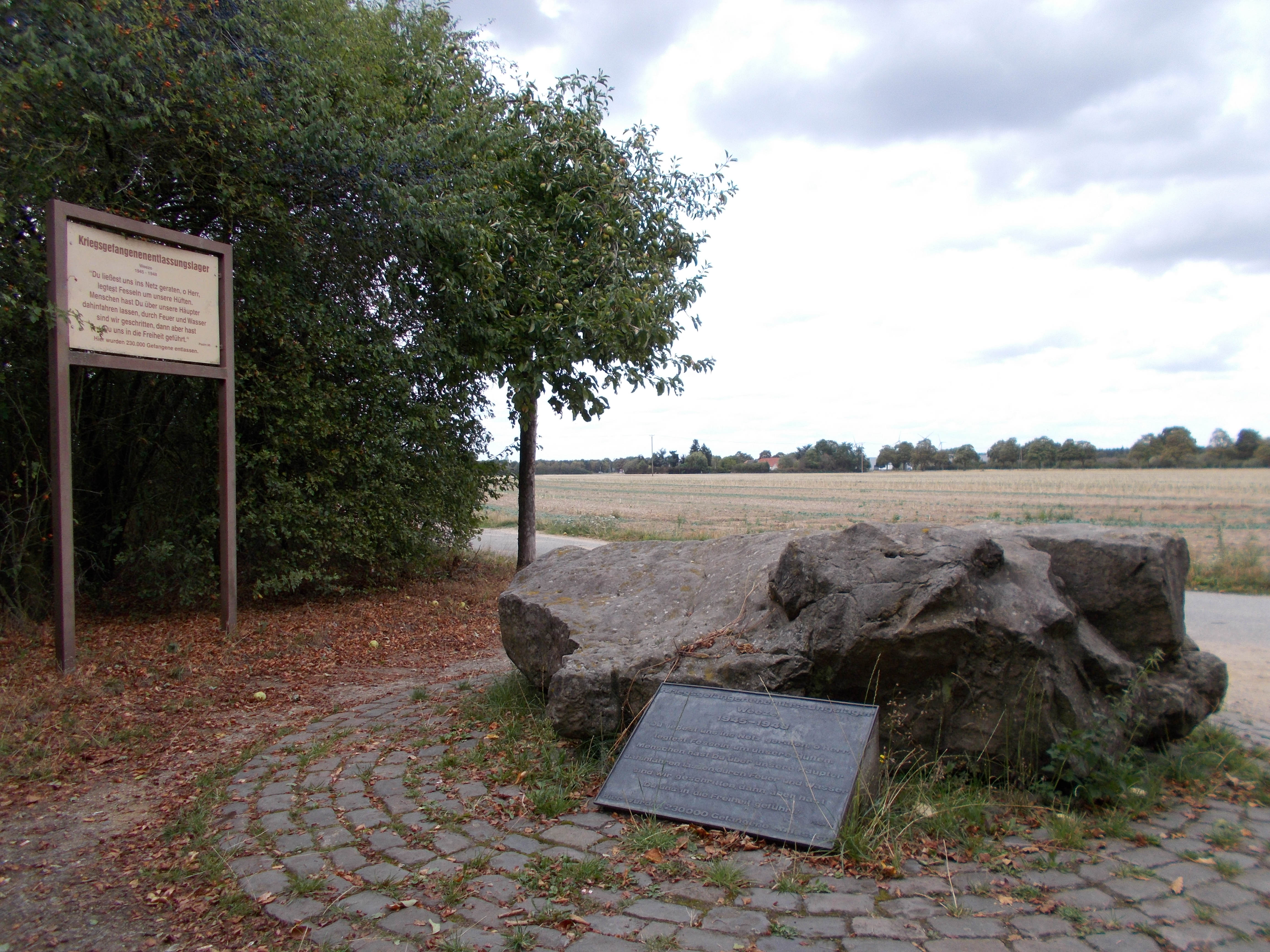 Denkmal Kriegsgefangenenentlassungslager Weeze bei Schloss Wissen. Hier wurden zwischen 1945-1948 230.000 deutsche Kriegsgefangene in die Freiheit entlassen.